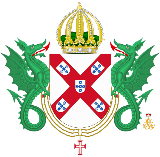 Brasão da Família Imperial Brasileira, um ramo internacional da Casa de Bragança portuguesa.